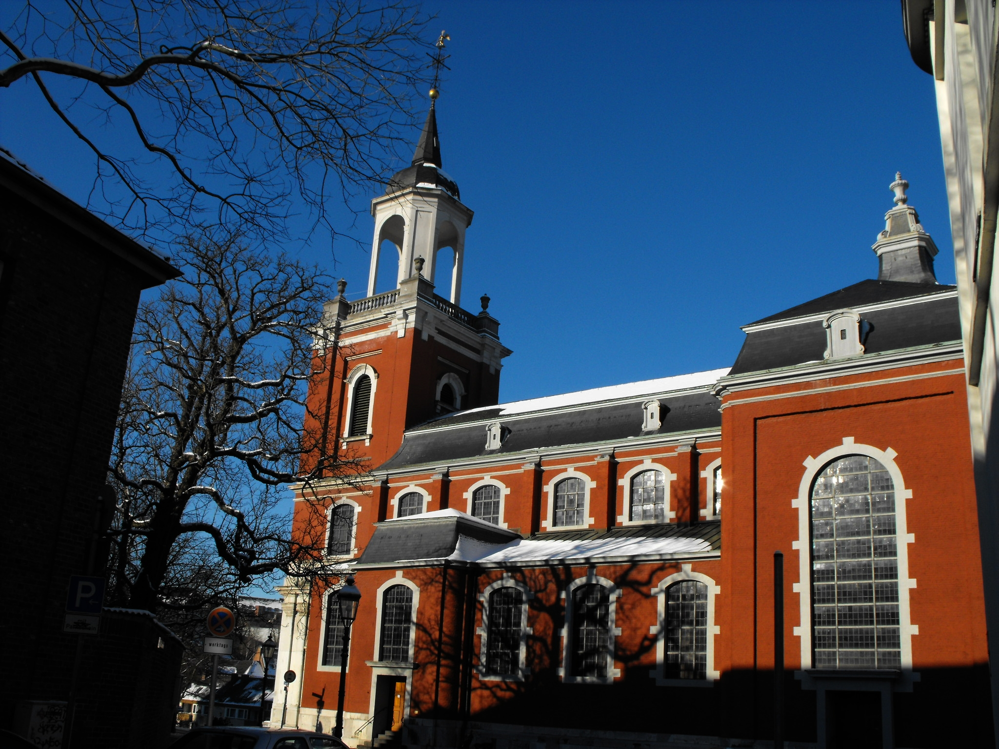 Die Kirche St. Michael in Burtscheid